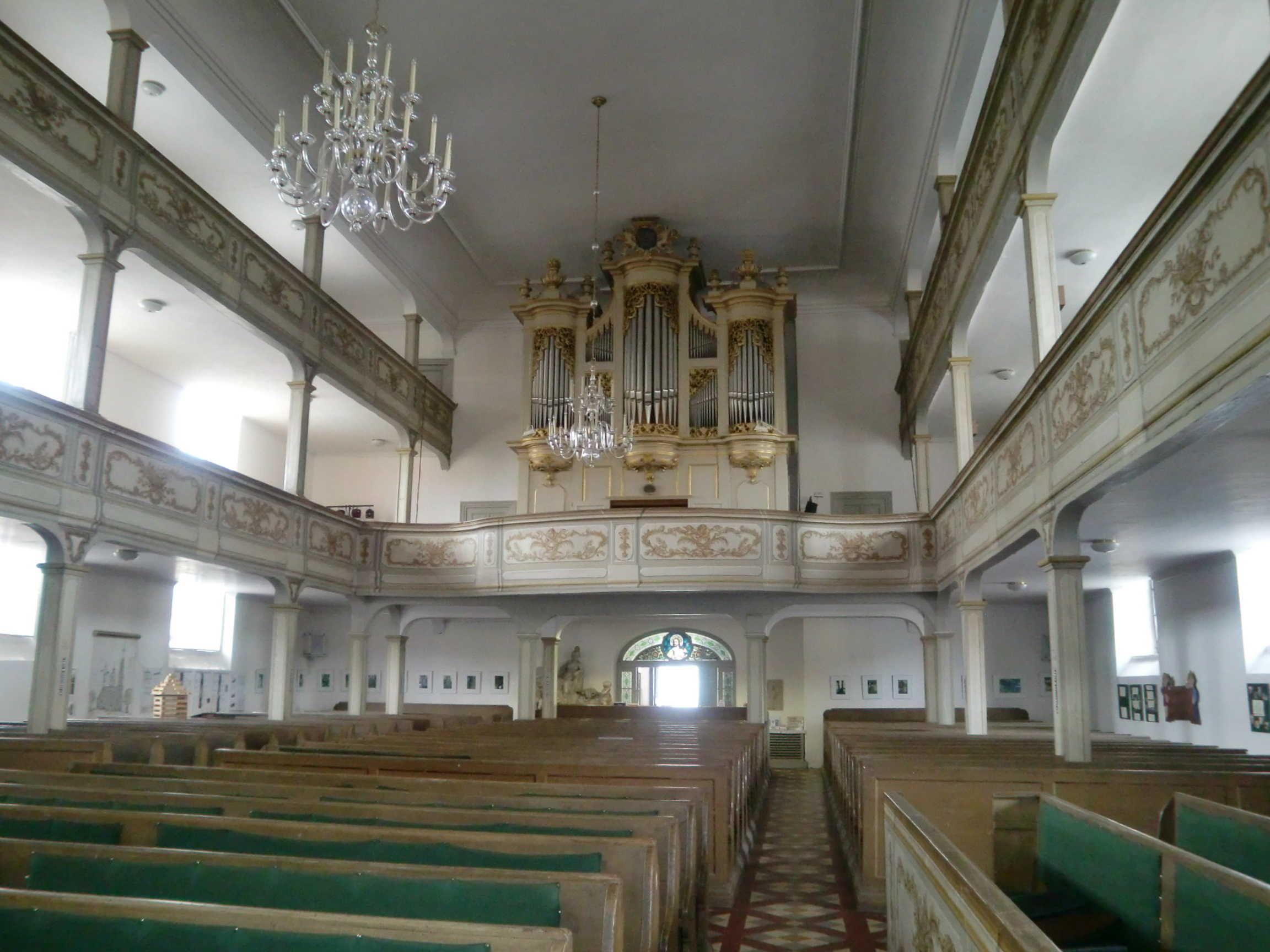 Sankt-Nikolai-Kirche Lübbenau, Blick zur Orgel